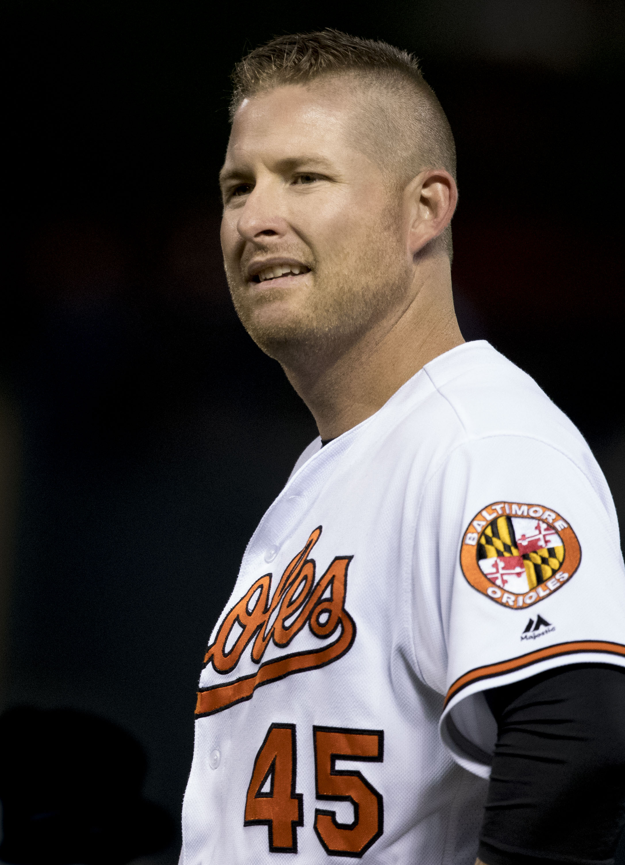 Mark Trumbo